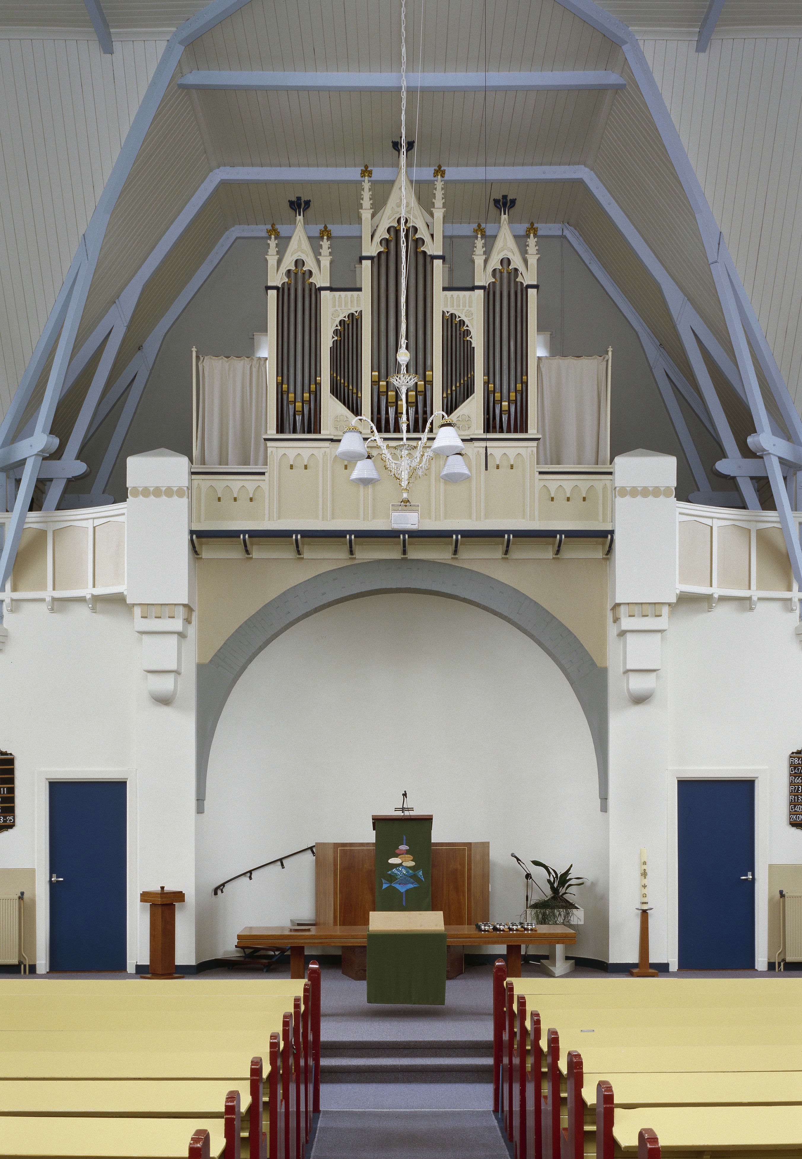 Voormalige Gereformeerde Kerk: Interieur, aanzicht orgel, orgelnummer 11 (opmerking: Gefotografeerd voor Het Historische Orgel in Nederland 1894-1901, bladzijde 199)